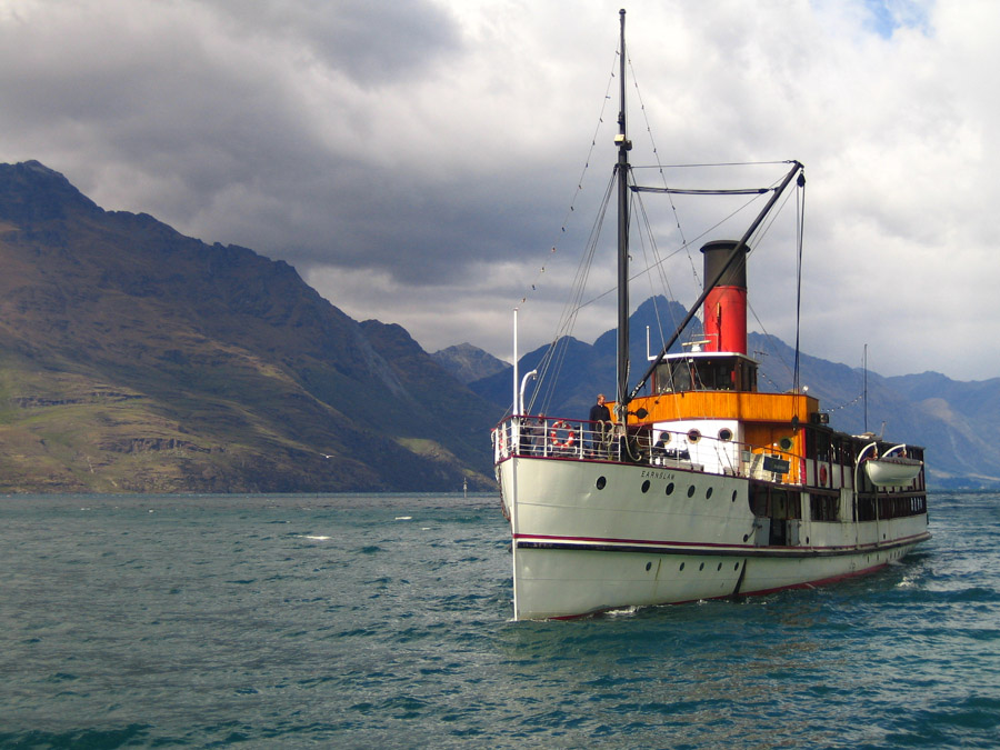 Photo navire à vapeur à Queenstown (photo personnel 2006) Utilisateur:FRED